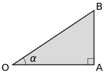 Եռանյունաչափական ֆունկցիայի հաշվում սուր անկյունով